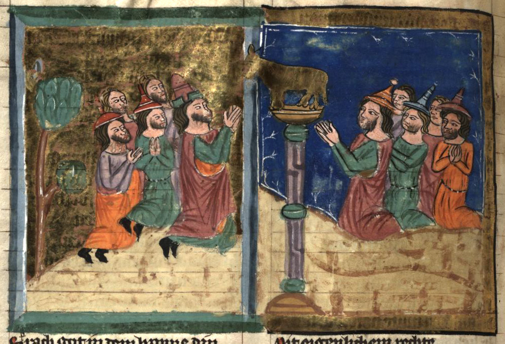 Rudolf von Ems: Weltchronik. Böhmen (Prag), 3. Viertel 14. Jahrhundert. Hochschul- und Landesbibliothek Fulda, Aa 88. Bildbeschreibung nach Martin Roland. Miniatur 47 112v Die Israeliten beten das goldene Kalb an